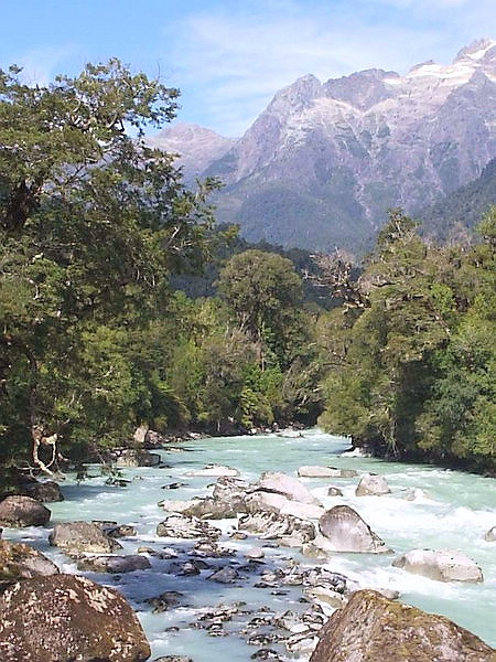 Río Blanco (Agradecimientos a mi hermana Mariela Mecklenburg)